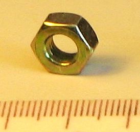 Ŝraŭbingo kun ena metreca ŝraŭbeco M6 Mi, aŭtoro de la bildo, permesas al ĉiuj uzi ĝin kun ĉi tiaj kondiĉoj